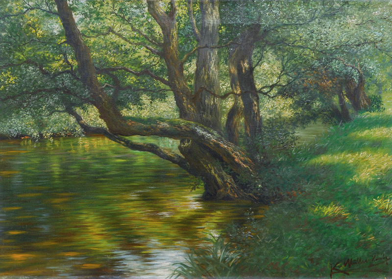 Am Alsterlauf, Öl auf Leinwand, 50 x 69 cm